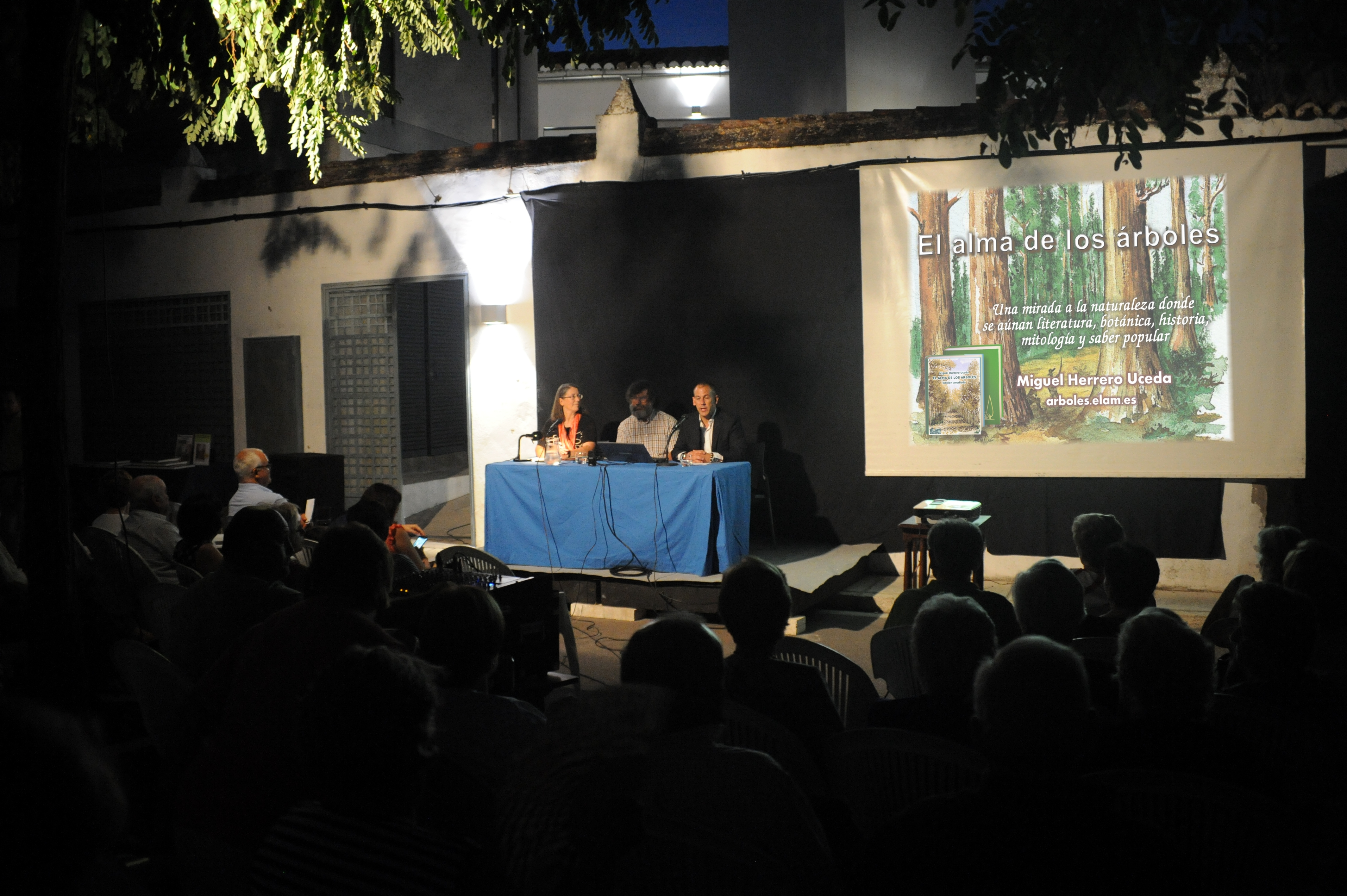 Centro de Vías Pecuarias, Malpartida de Cáceres. En el exterior del Centro se realizan muchas actividades culturales al aire libre durante los meses de verano.